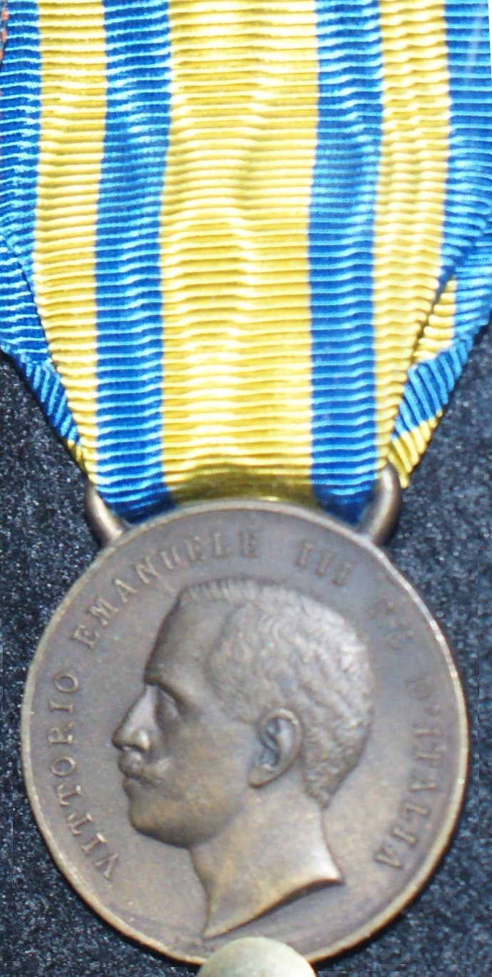 Medaglia commemorativa della Campagna in Cina. Collezione privata.